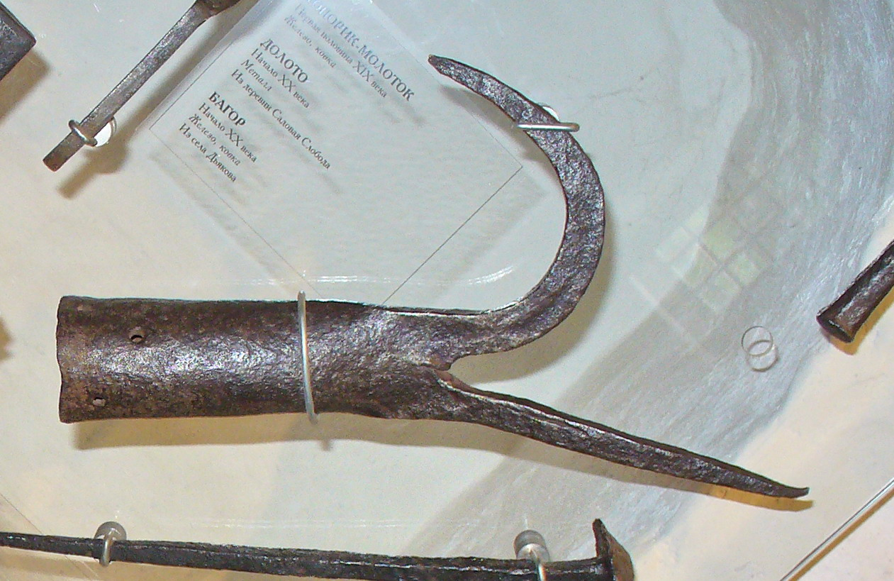 Багор. Начало XX века. Из с. Дьякова.